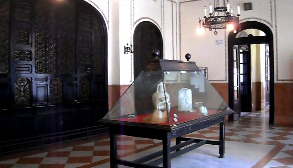 Interni della stazione di Taormina-Giardini